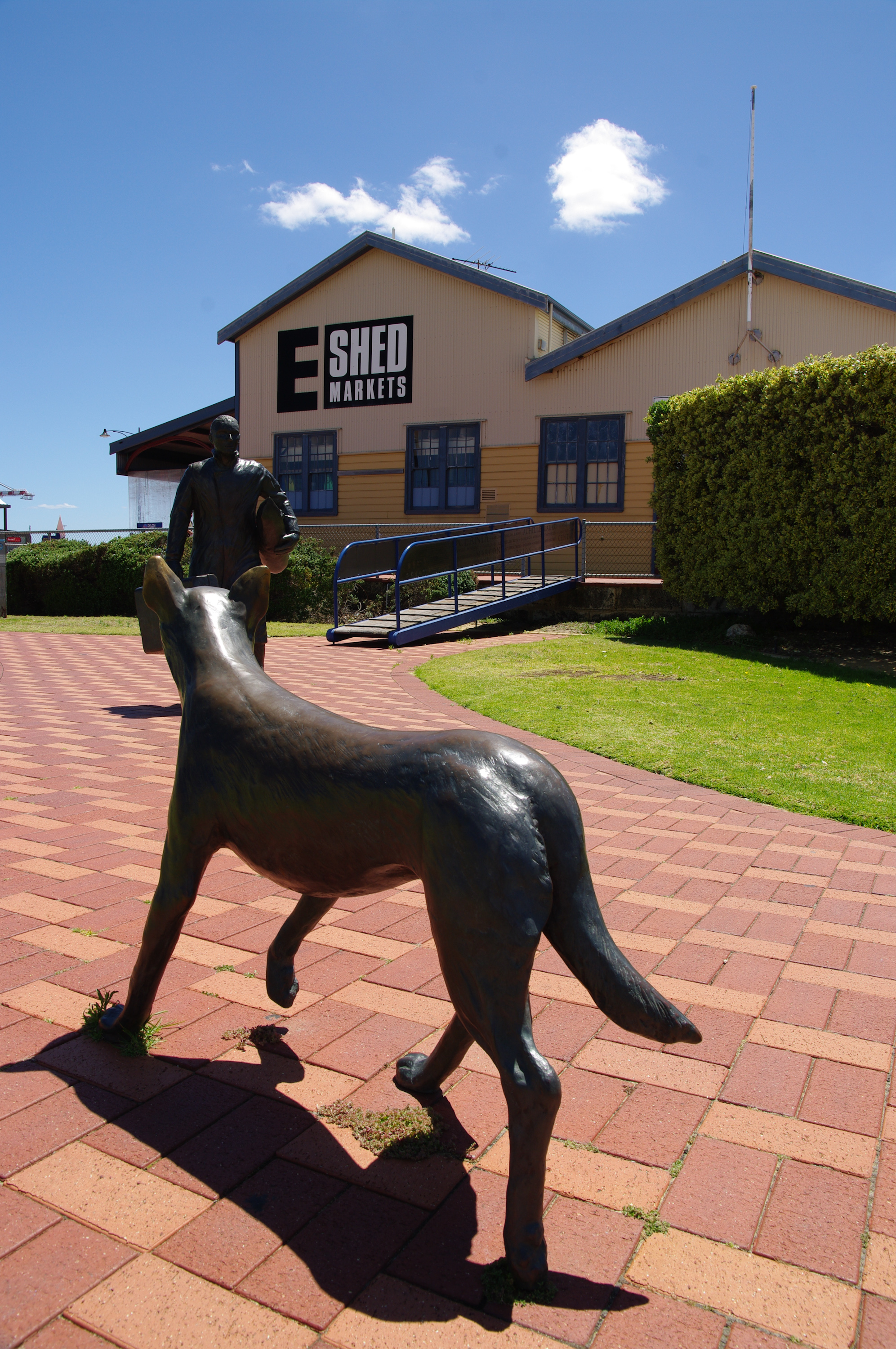 Wiki takes Fremantle 2 E-Shed markets